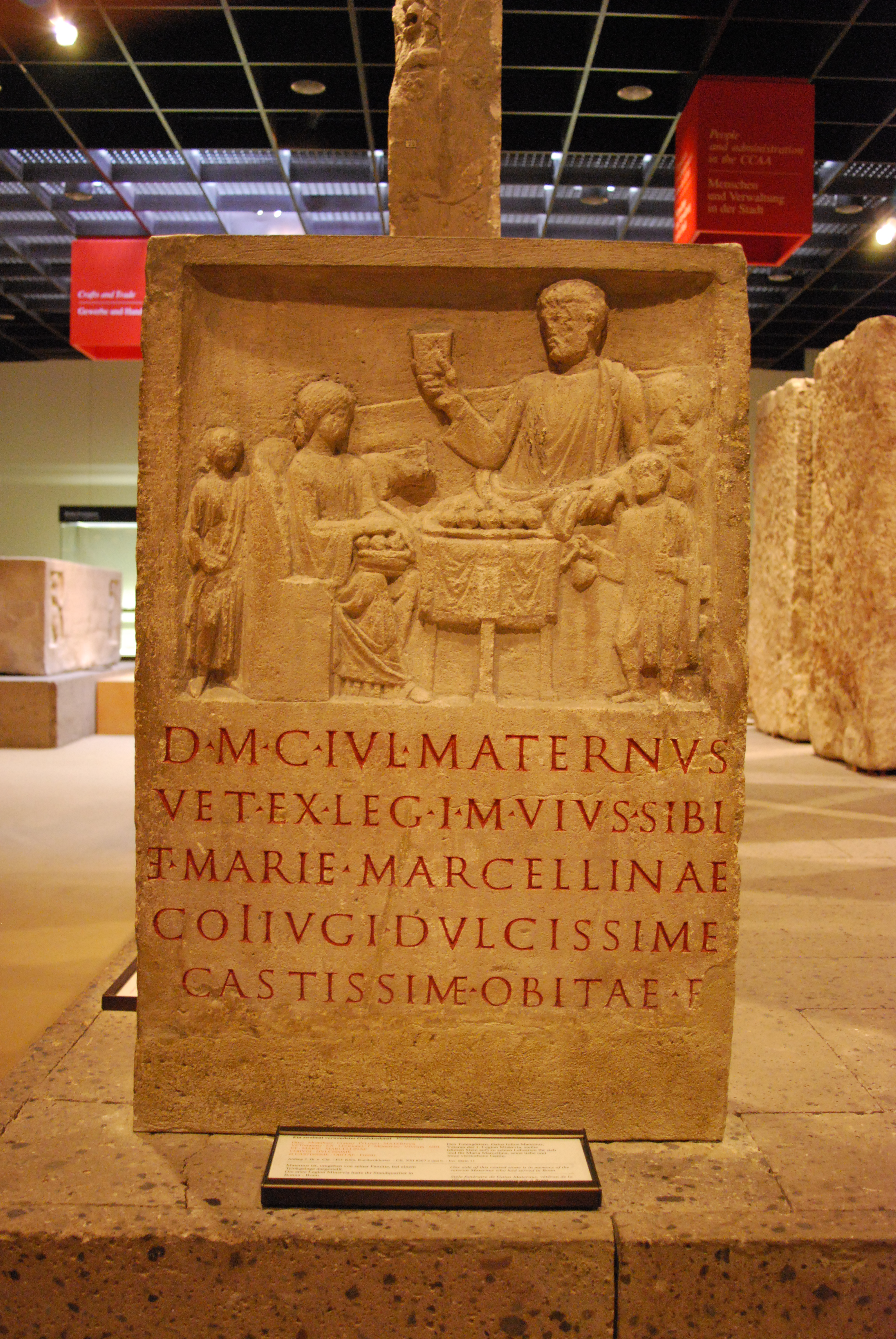 Grabstein für die Frau des Gaius Iulius Maternus, Veteran der LEG I Minerva (2. Jh.); Römisch-Germanisches Museum Köln; CIL XIII 8267